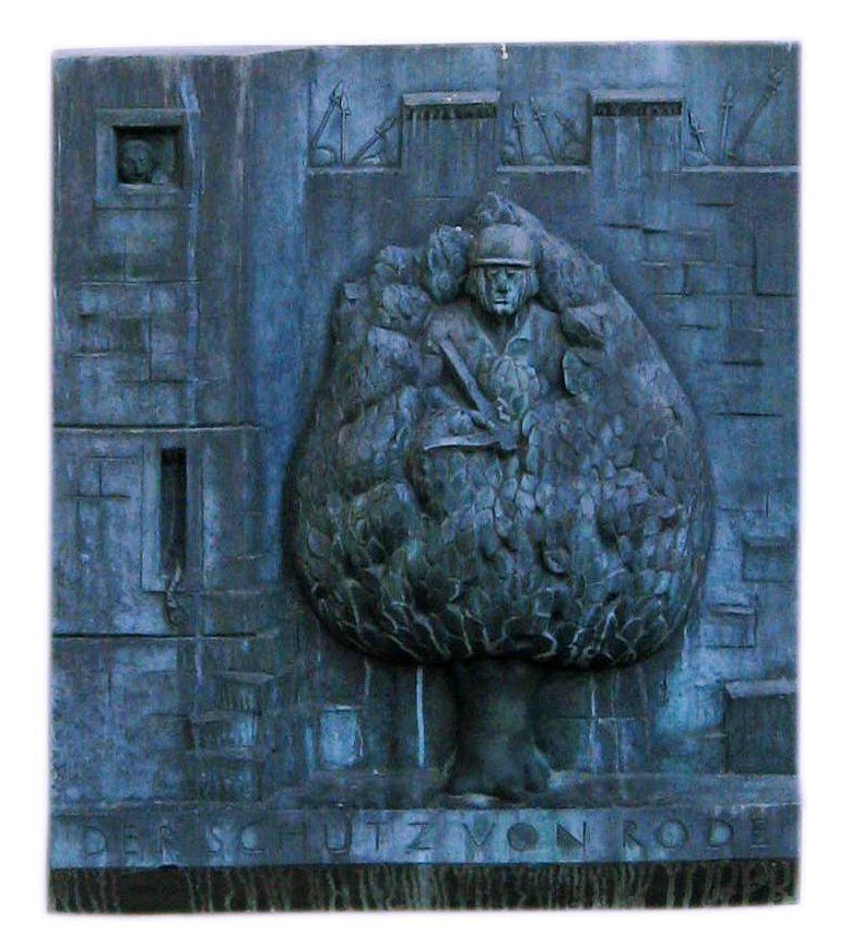 Der Schutz von Rode